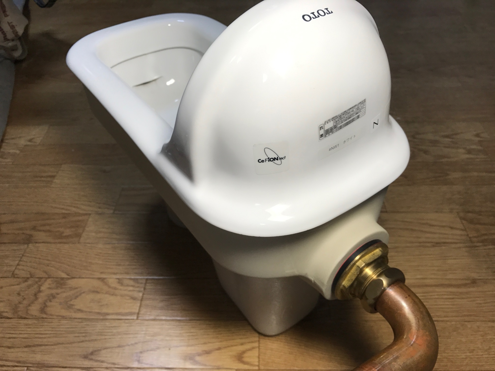 銅管組込み